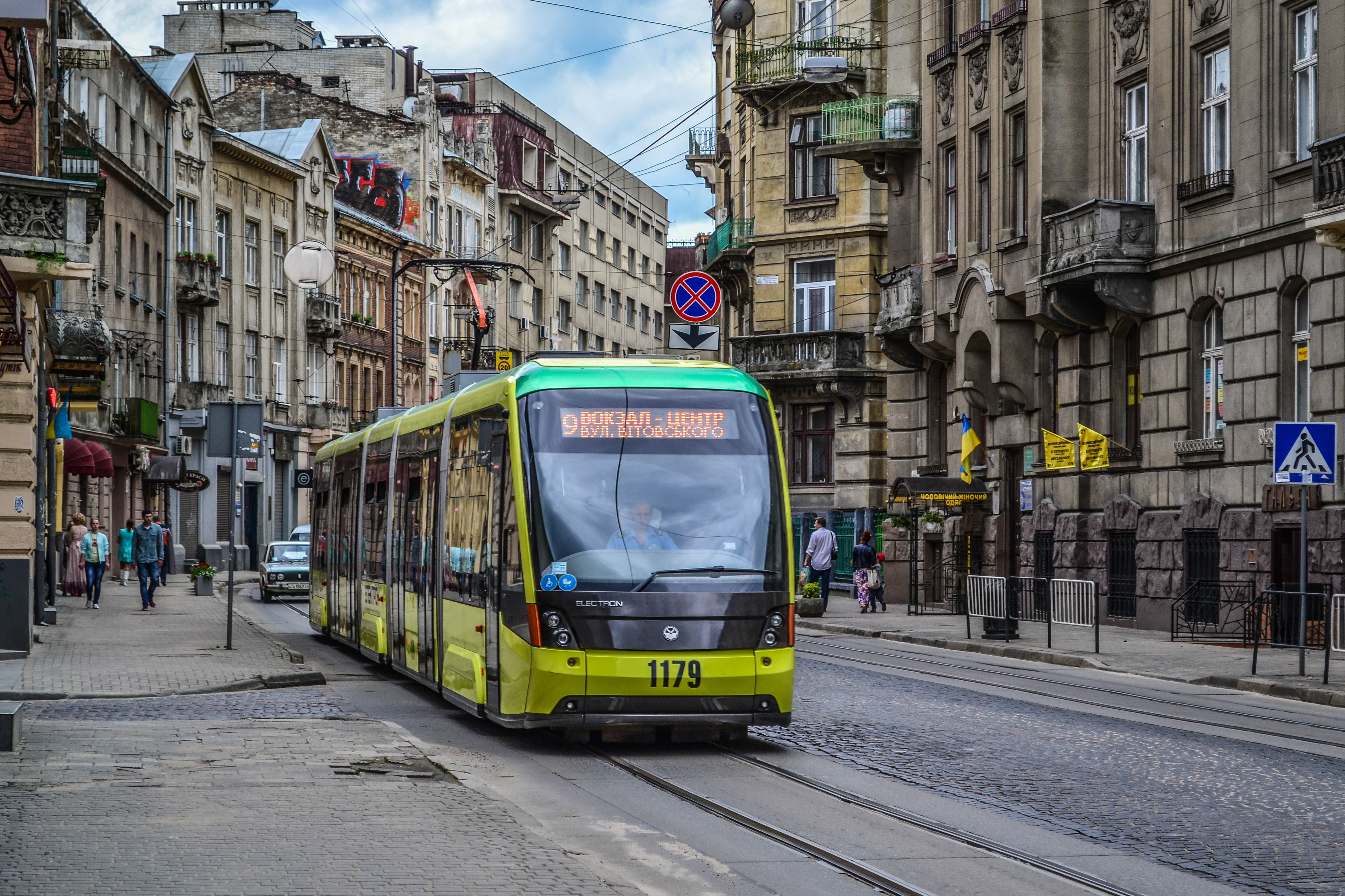 Electron 1179 на Франка